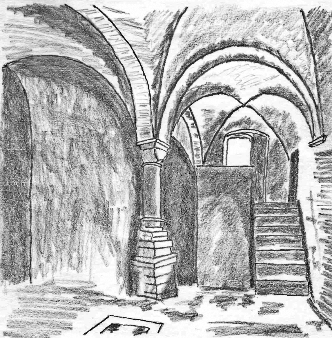 Kölner Rathaus, Plasmanscher Keller. Ehemaliger Grundbesitz (bis 1349) der jüdischen Gemeinde im Bezirk St. Laurenz